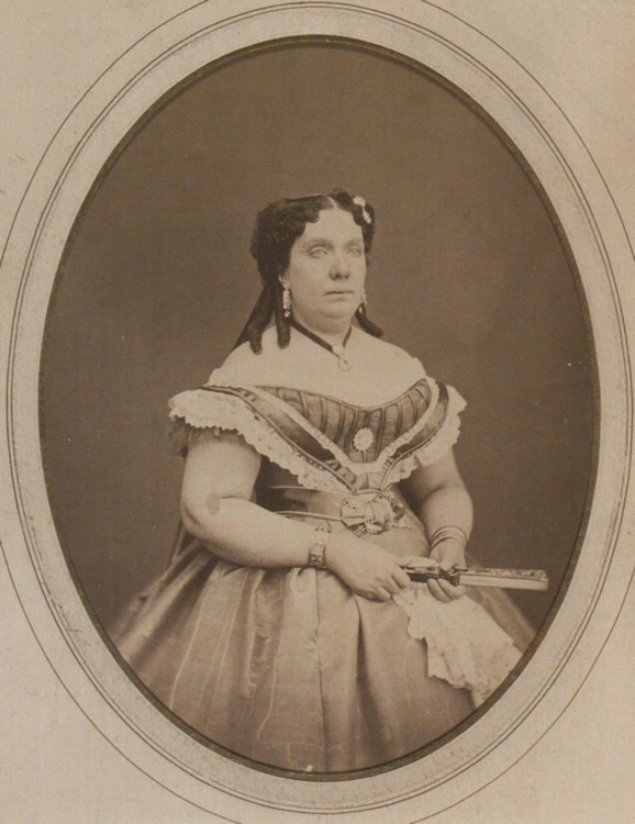 Fotografía de Isabel II.